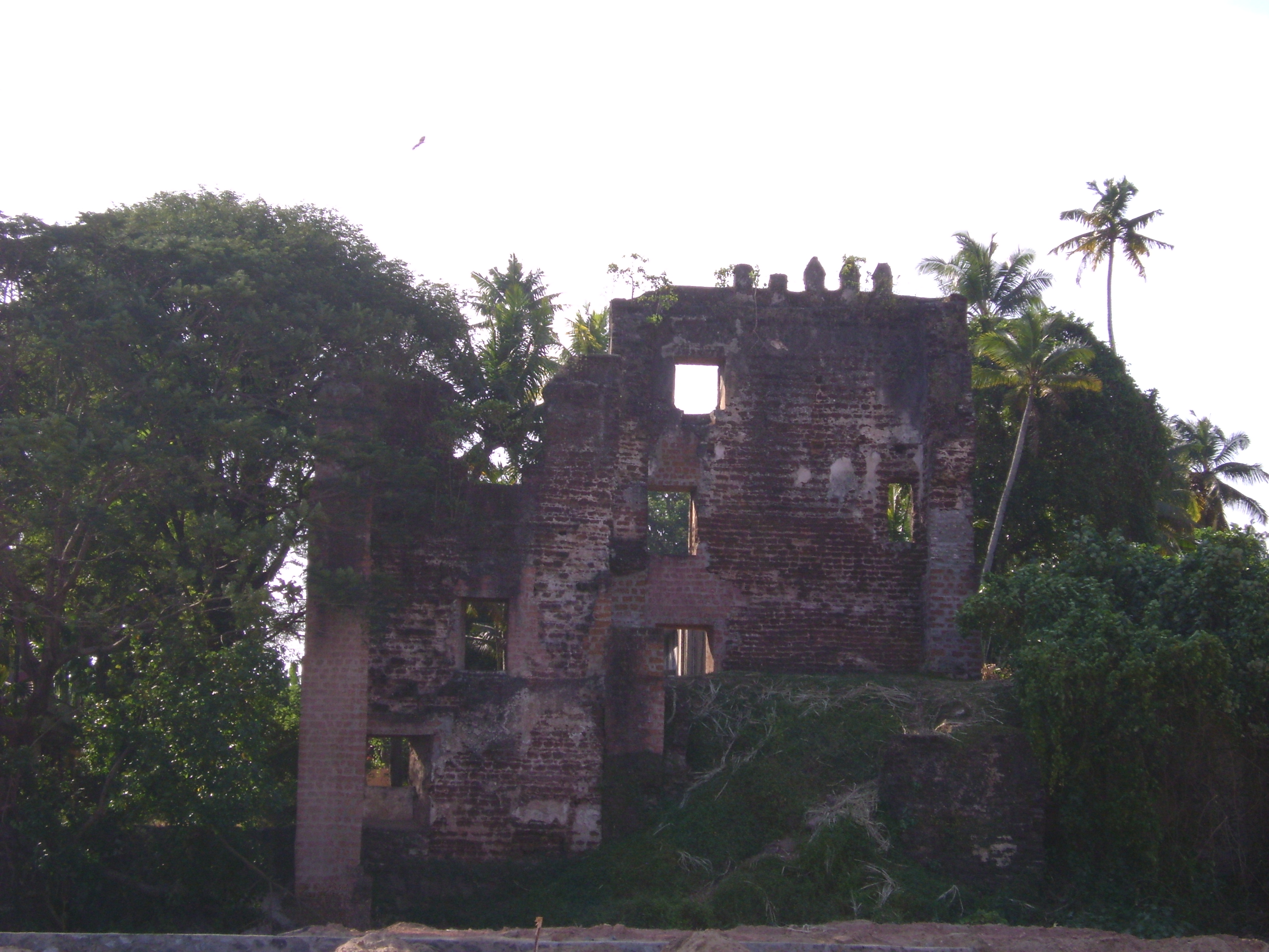 തങ്കശ്ശേരിയിലെ ഡച്ച് കോട്ടയുടെ അവശിഷ്ടങ്ങള്‍. തങ്കശ്ശേരി എന്ന ലേഖനത്തിന് ഉപയോഗിക്കാവുന്നതാണ്.